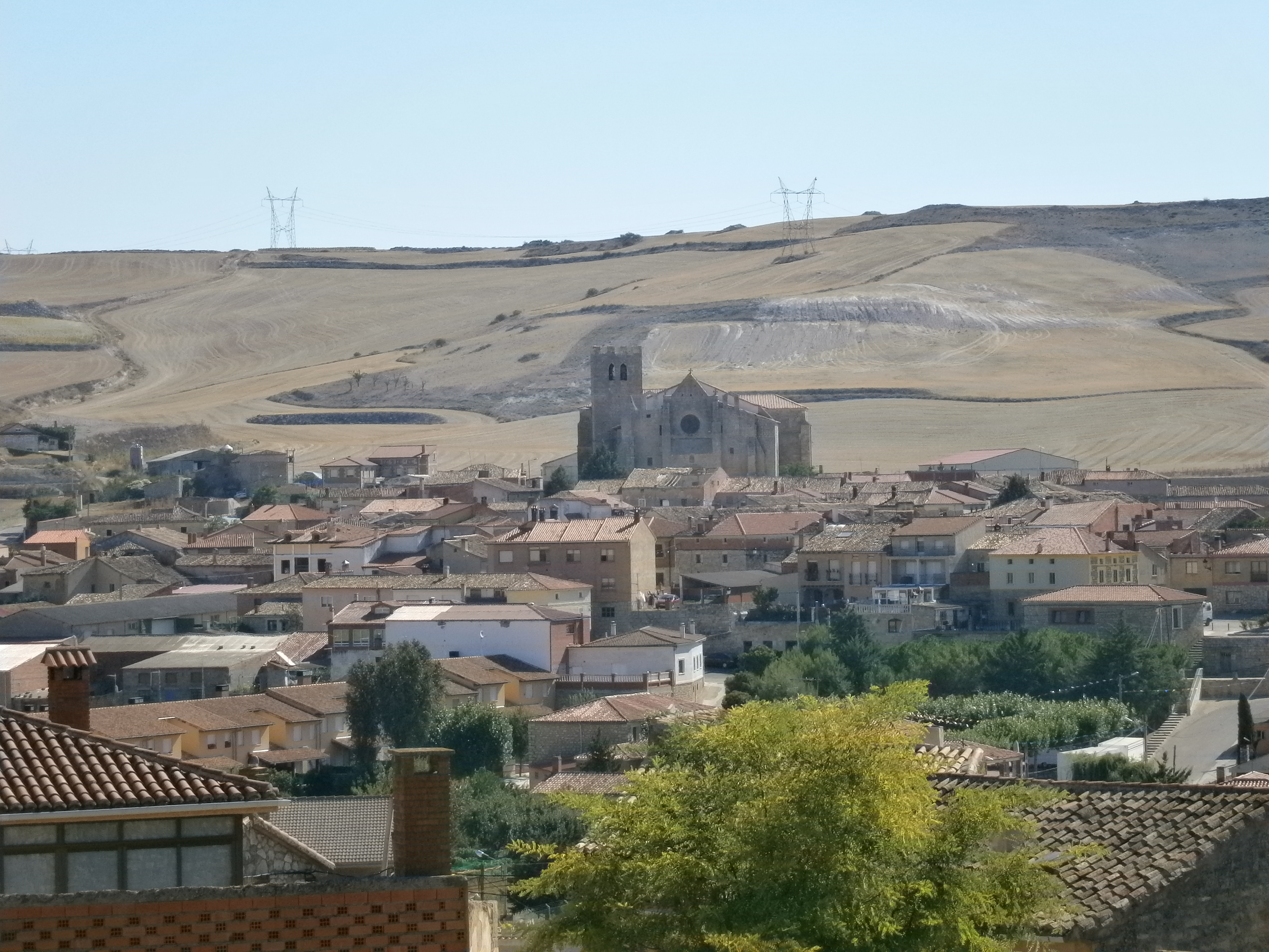 Iglesia de San Esteban vista desde la Iglesia de San Millán en Los Balbases. Provincia de Burgos. (España)